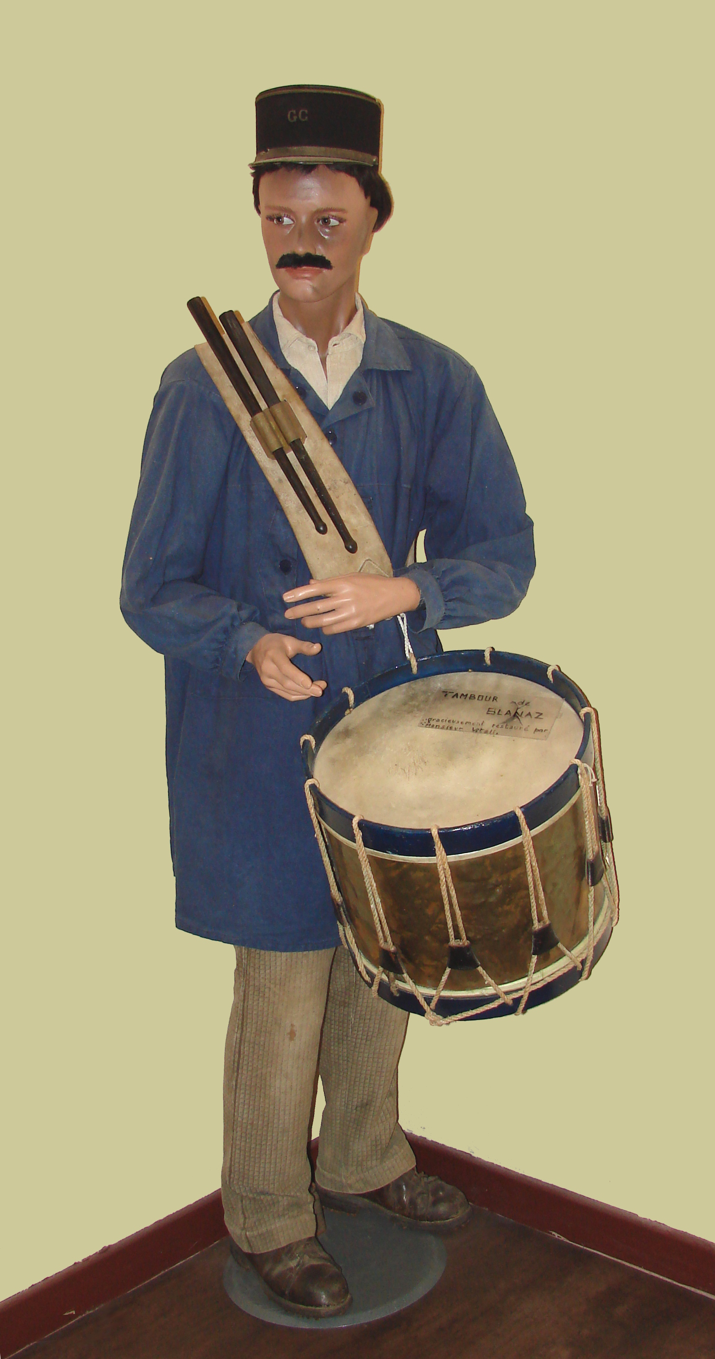 Uniforme de garde-champêtre, début du XX siècle. Musée des traditions bugistes, Saint-Rambert-en-Bugey, France.